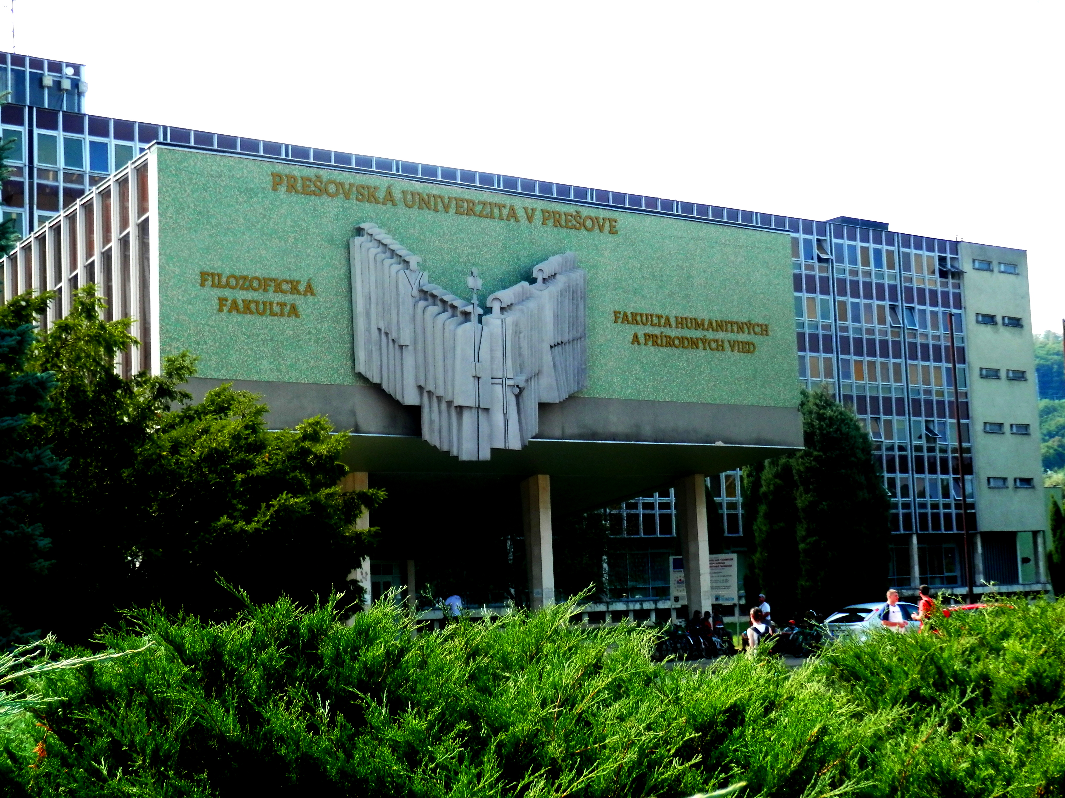 Leto 2018. Aula Prešovskej univerzity. Ulica 17.novembra. Mesto Prešov. Slovensko.